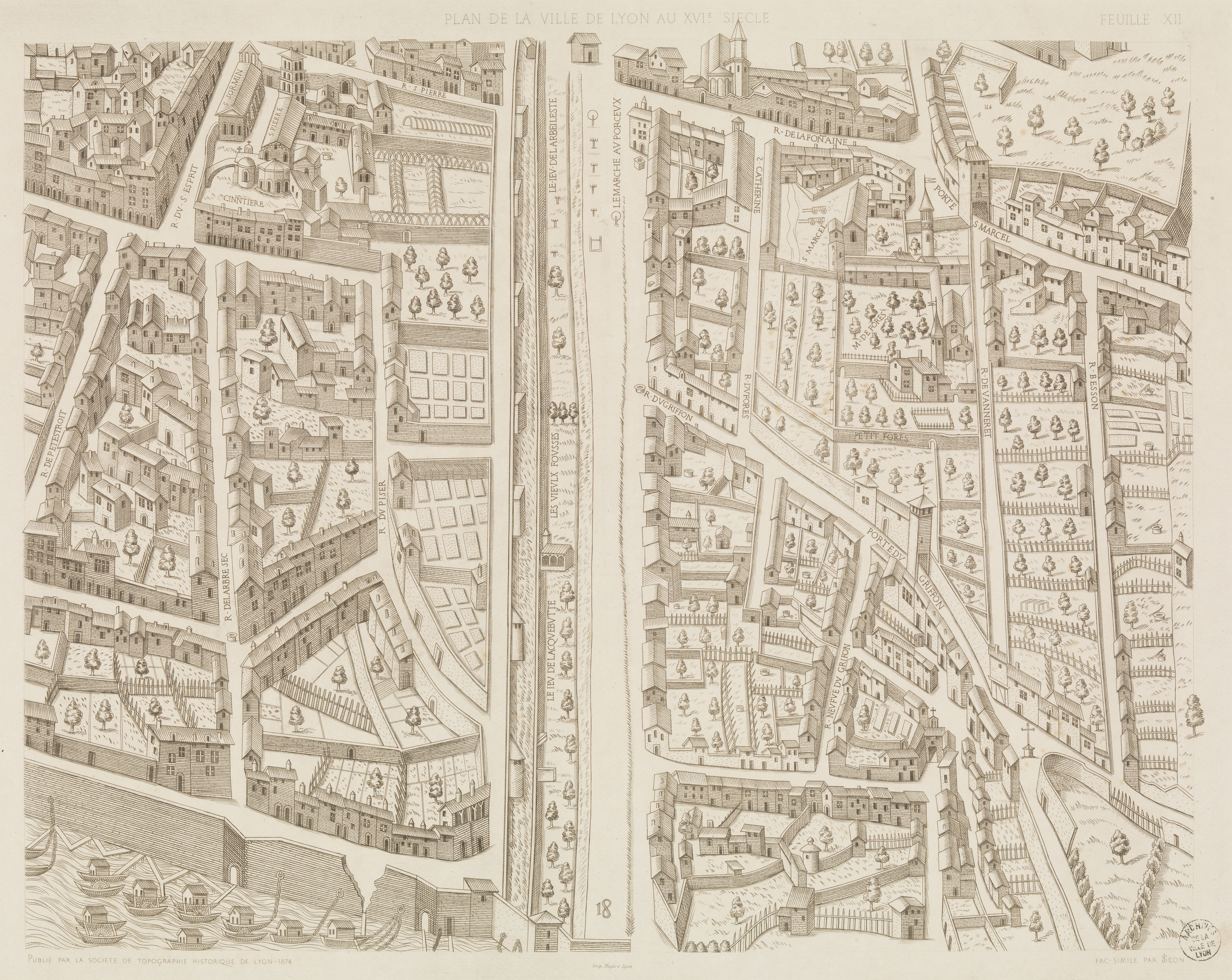 Détail du fac-similé de 1872-1876 de Le Plan scénographique de la ville de Lyon, c.1544-1553 montrant l'abbaye des Dames de Saint-Pierre vers 1550, archives municipales de la ville de Lyon